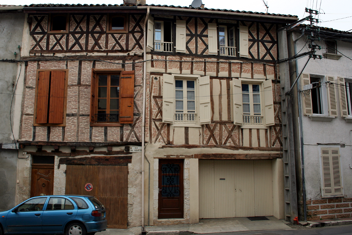 Eauze, Gers, France.